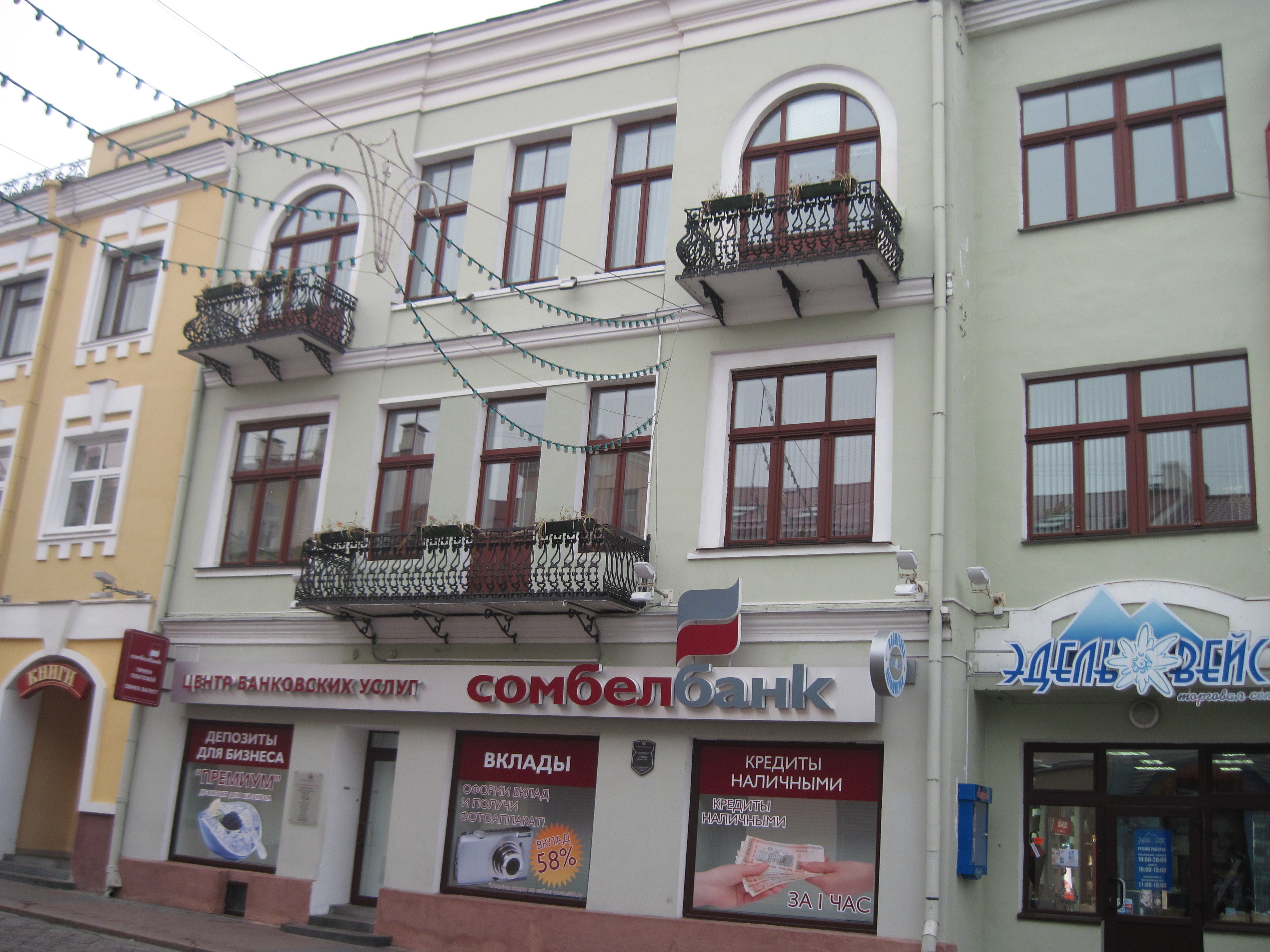 Беларуская (тарашкевіца): Гродна, Савецкая, 12